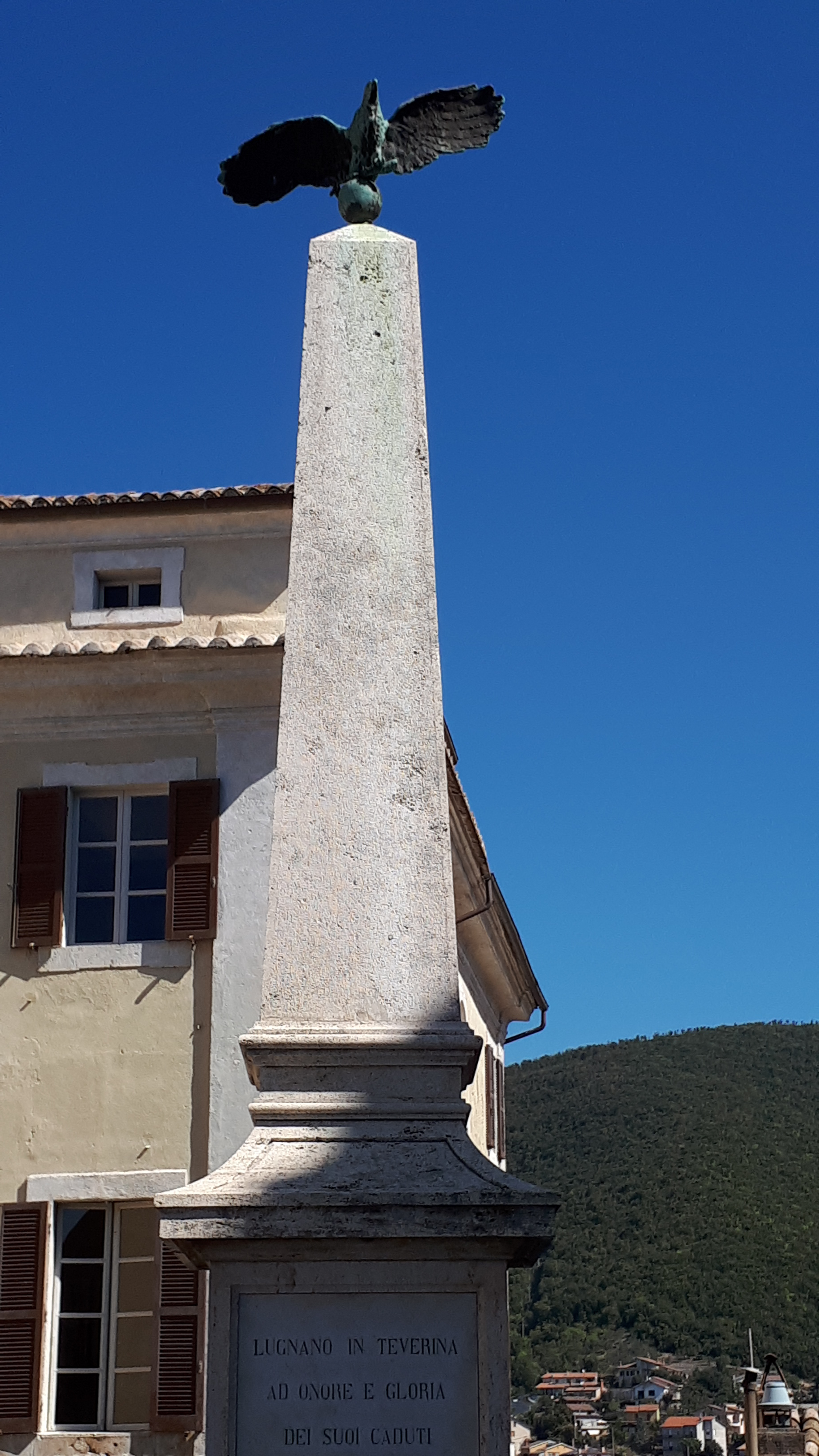 Lugnano in Teverina Monumento ai Caduti della I e II Guerra Mondiale